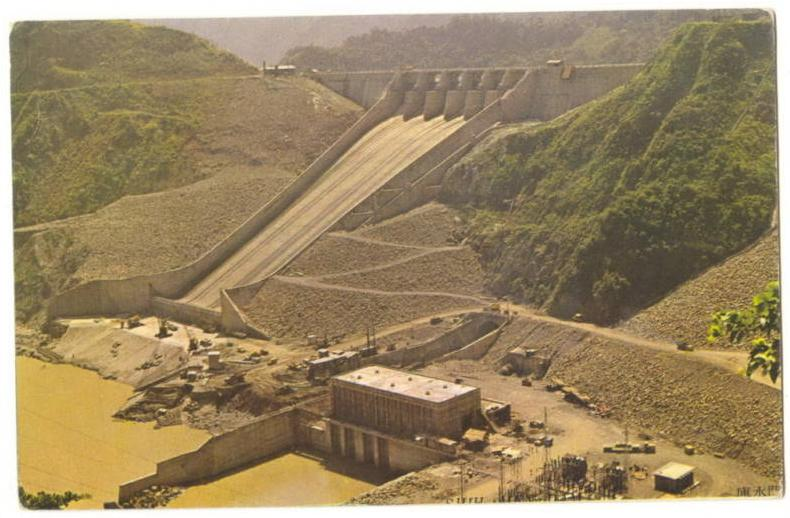 中文（台灣）: 興建中的石門水庫大壩及溢洪道。